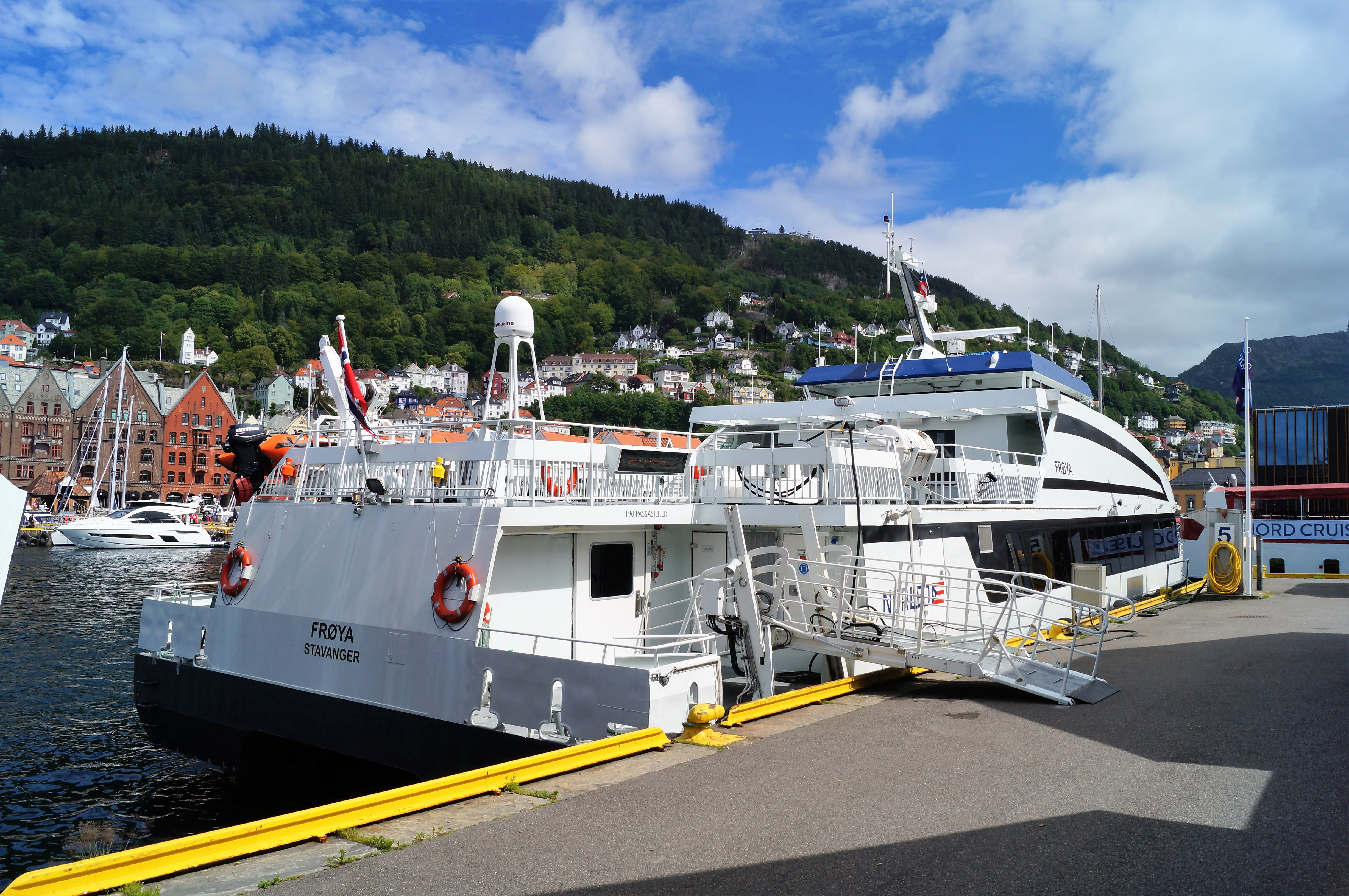 «Frøya» i Bergen